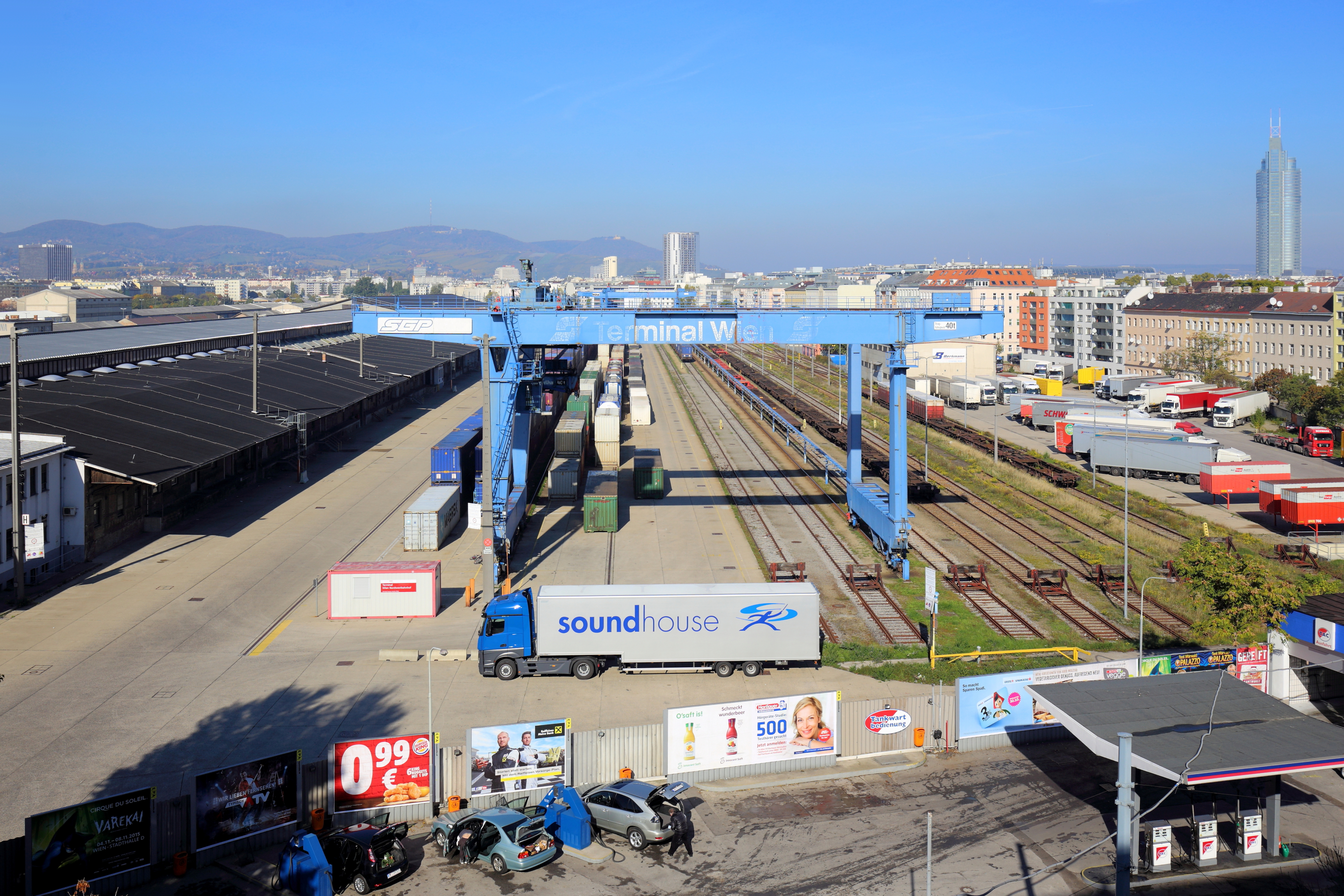 Südöstliches Areal des ehemaligen Nordwestbahnhofes im 20. Wiener Gemeindebezirk Brigittenau. Im Hintergrund ganz links das TGM-Hochhaus mit der dunklen Fassade und ganz rechts der 202 Meter hohe Millennium Tower. Am Horizont die östlichen Ausläufer des Wienerwaldes mit der höchsten Erhebung Wiens, dem 542 Meter hohen Hermannskogel (ganz links). Im Anschluß der 516 Meter hohe Vogelsangberg, der 494 Meter hohe Peter-Paul-Berg, der 484 Meter hohe Kahlenberg mit dem Sender Kahlenberg und der 425 Meter hohe Leopoldsberg mit der Burg am Leopoldsberg. Aktuell wird das Areal als Terminal Wien Nordwestbahnhof genutzt. Geplant ist, das Terminal aufzulassen und bis etwa 2025 auf dem rund 44 Hektar großen Areal einen neuen Stadtteil für rund 12.000 Einwohner zu errichten.